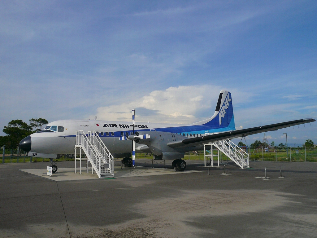 2011年7月9日に佐賀空港公園にて撮影。